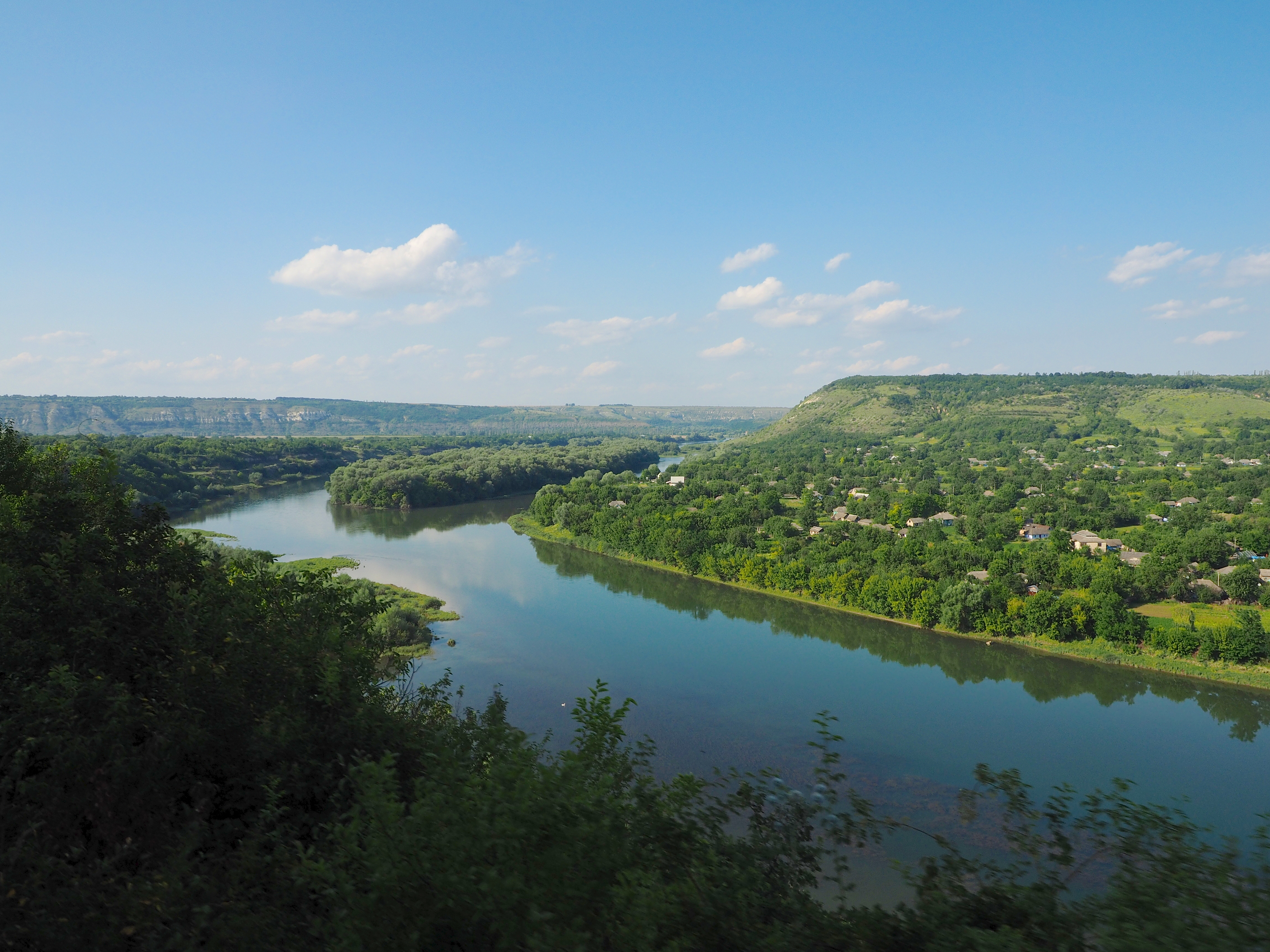 Taken from a Moscow to Chișinău, Moldova train.